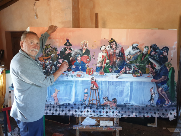 Mario Madiai